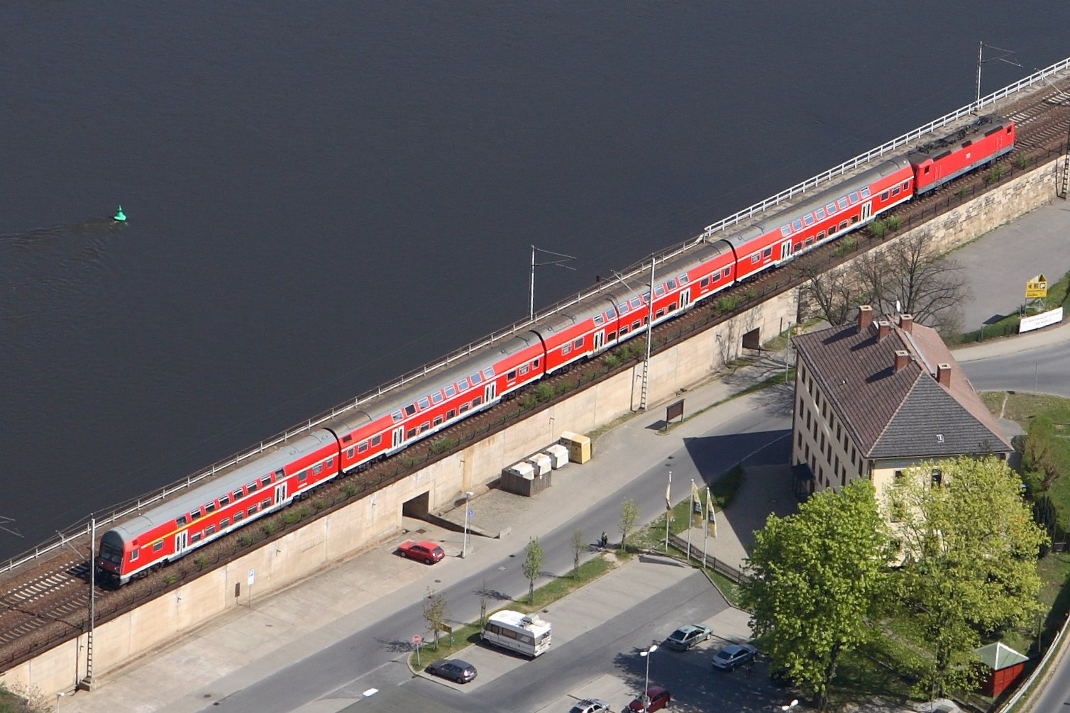 S-Bahn at Königstein, Saxony, Germany